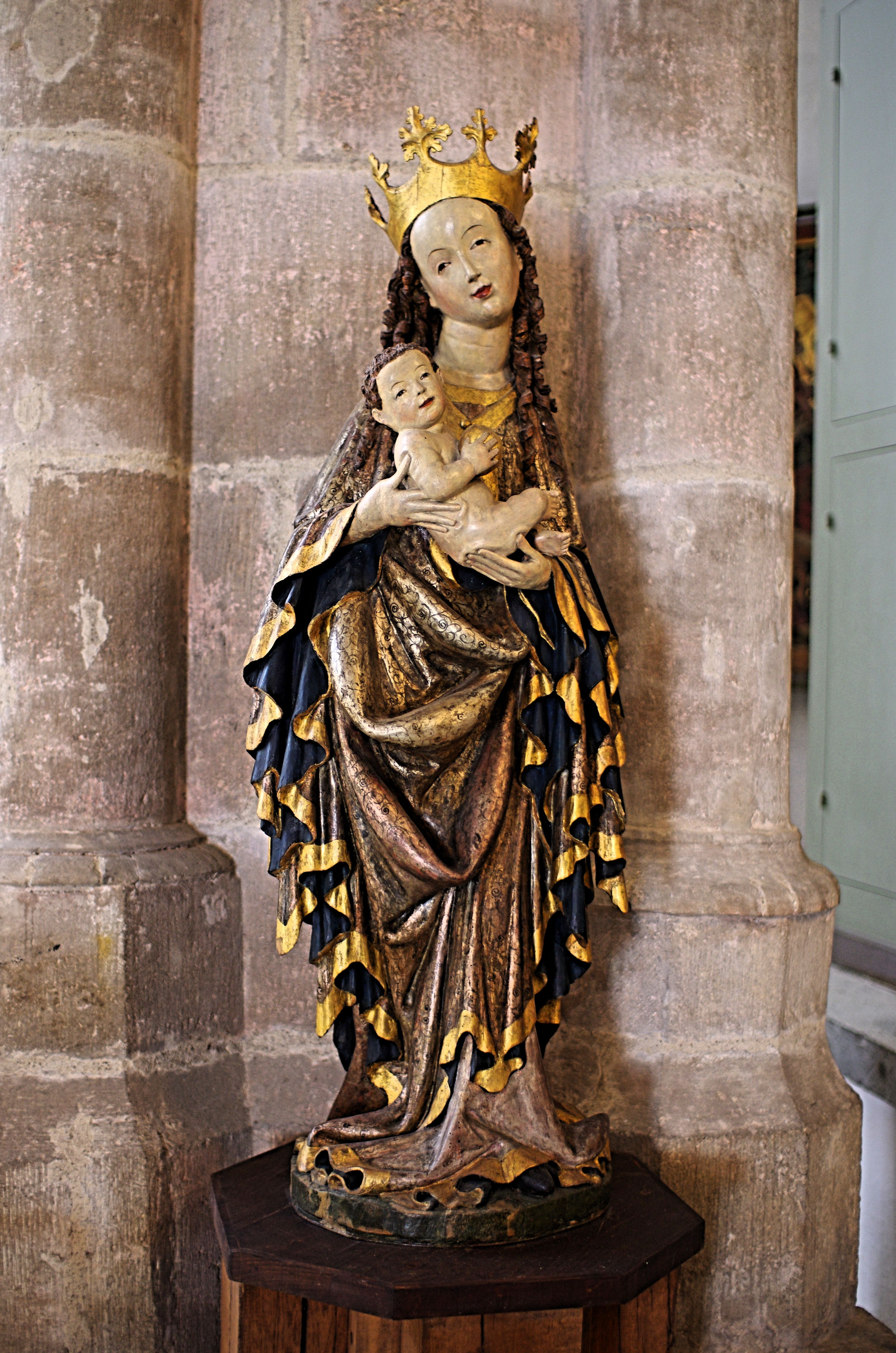 Arnstadt in Thüringen. Madonna in der Kirche.